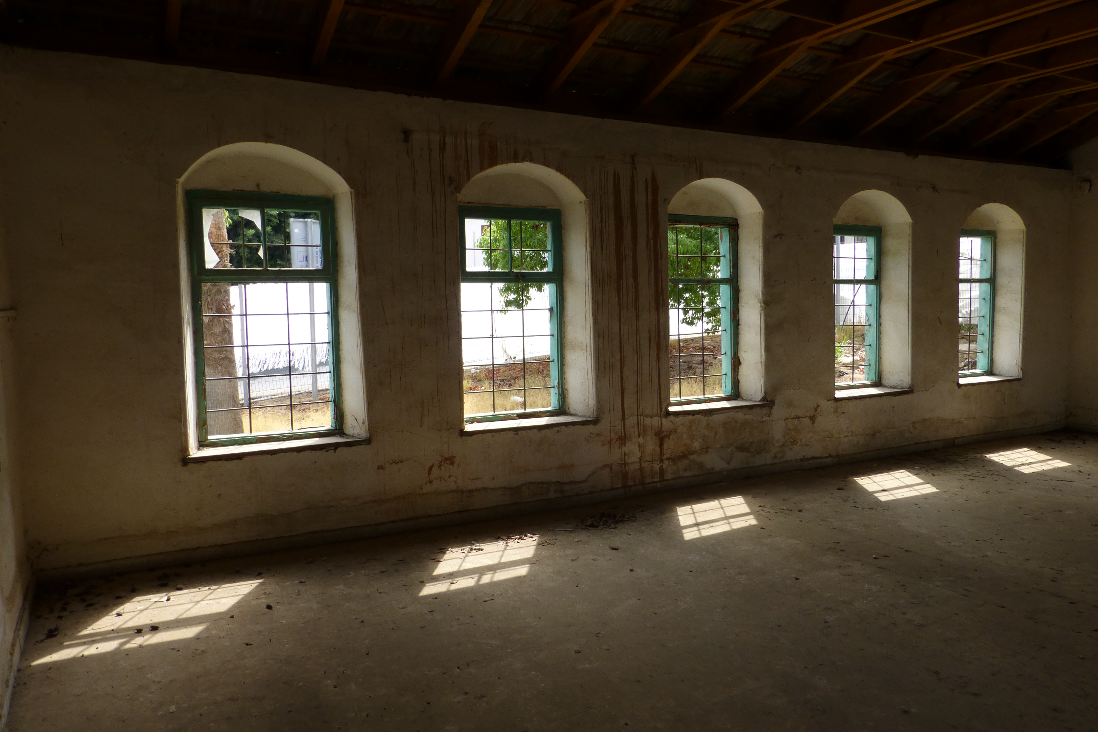 ביתם של מינה בנימין פוקס, מהבתים הראשונים במושבה. מבנה בן קומה שנבנה ב-1888 מאבני כורכר. ב-1970 עבר המבנה לידי "בני ברית" ושימש כמועדון לנוער וקשישים. מ-2004 עומד נטוש ומיועד לשימור כחלק ממתחם המוזיאון לתולדות גדרה.